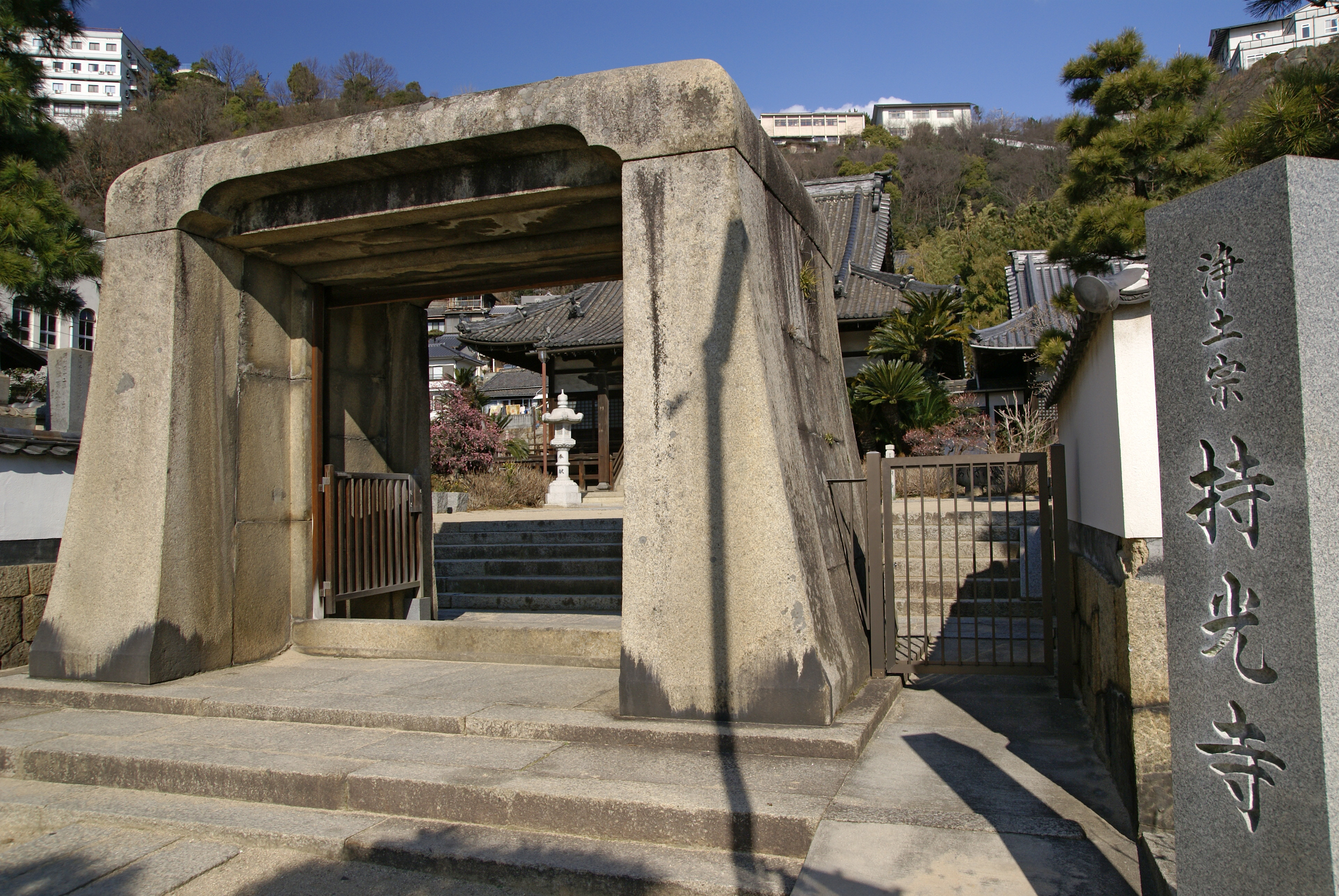 Jikoji in Onomichi, Hiroshima prefecture, Japan